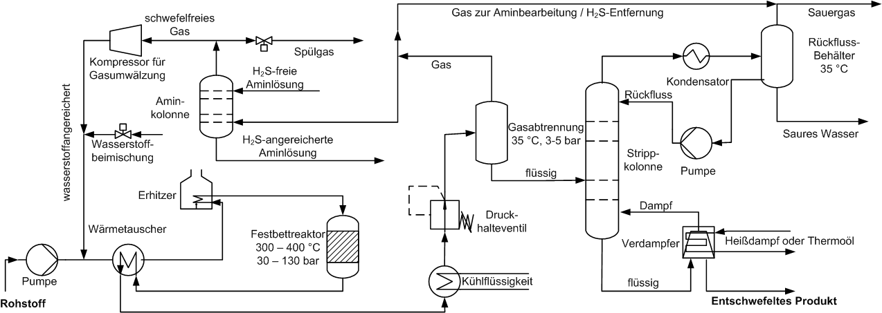 Hydrodesulfurierung, Prozessschema